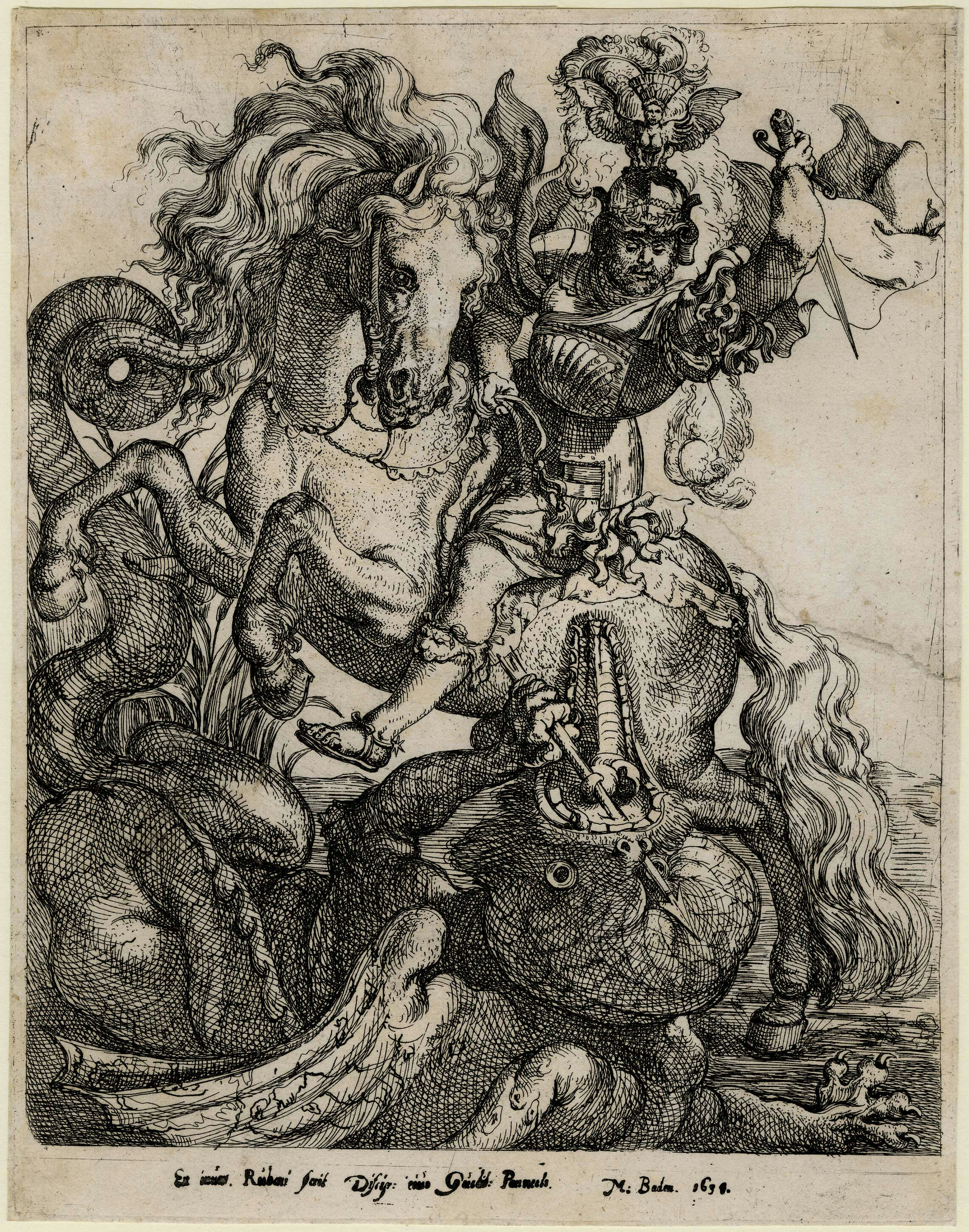 Sint Joris doodt de draaak